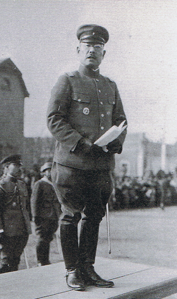 支那駐屯軍司令官・香椎浩平少将。昭和6年12月、於天津領事館前広場。 IJA Major General Kohei Kashii, the Commander in Chief of the China Garrison Army, inspecting his troops at the square next to the Japanese consulate in Tiānjīn, December 1931.